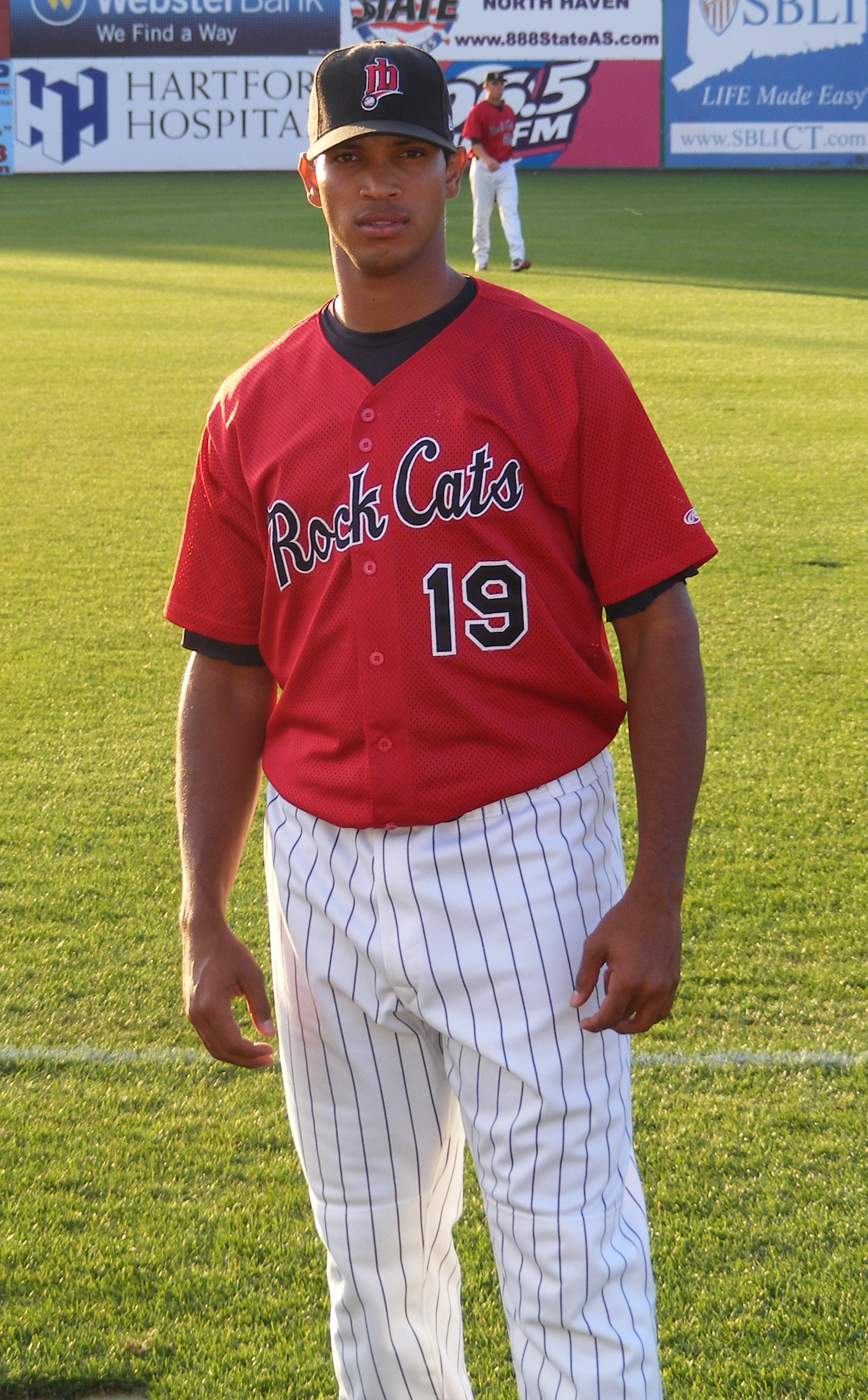 Armando Gabino